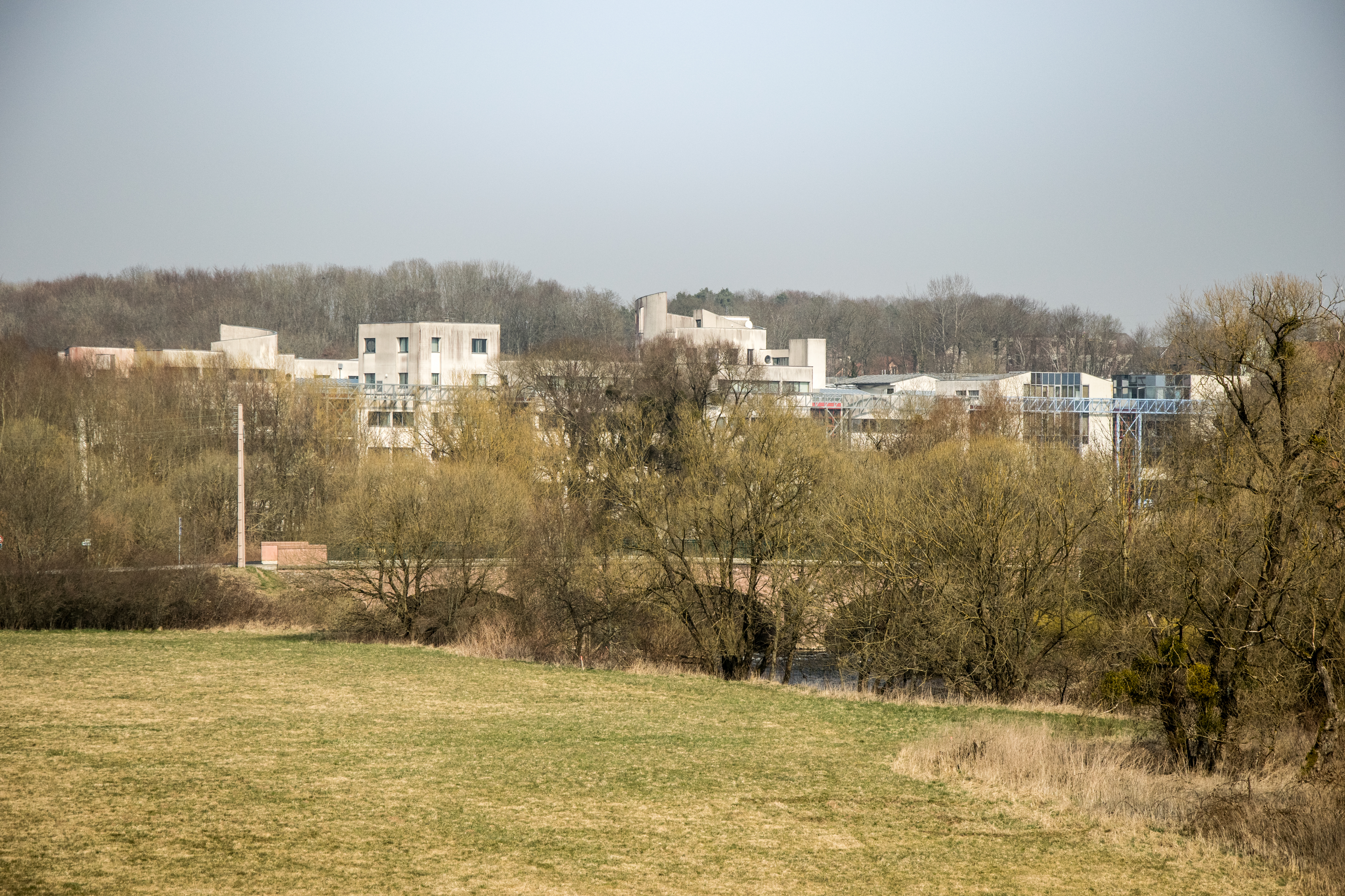 Village de Sevenans, Territoire de Belfort, France